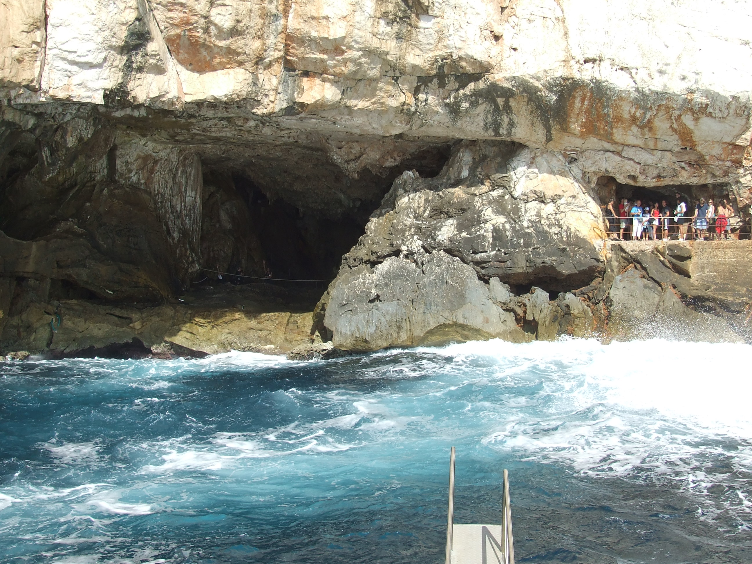 L'ingresso della grotta di Nettuno (Alghero)